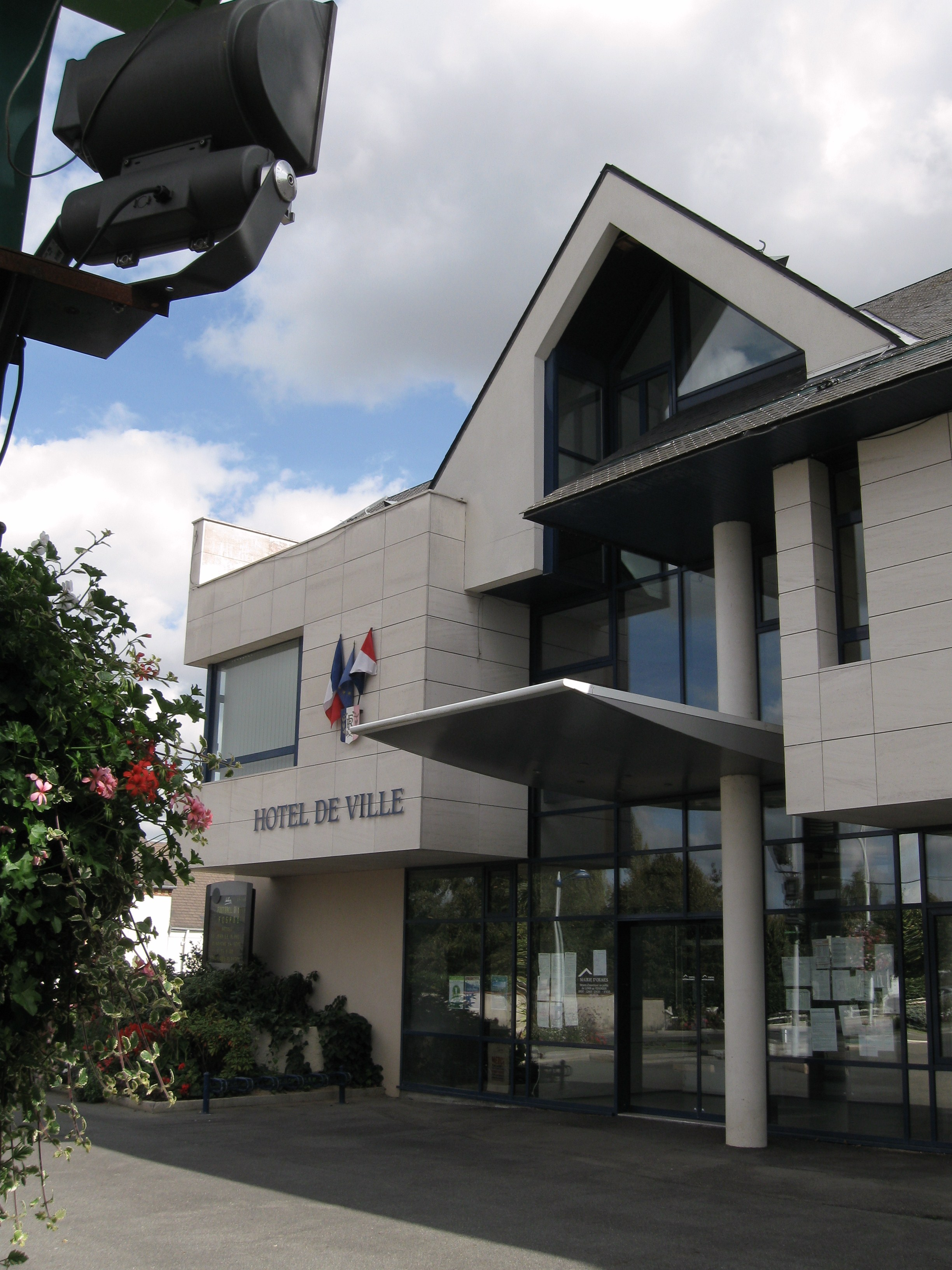 Hôtel de Ville, Ormes, Loiret, France